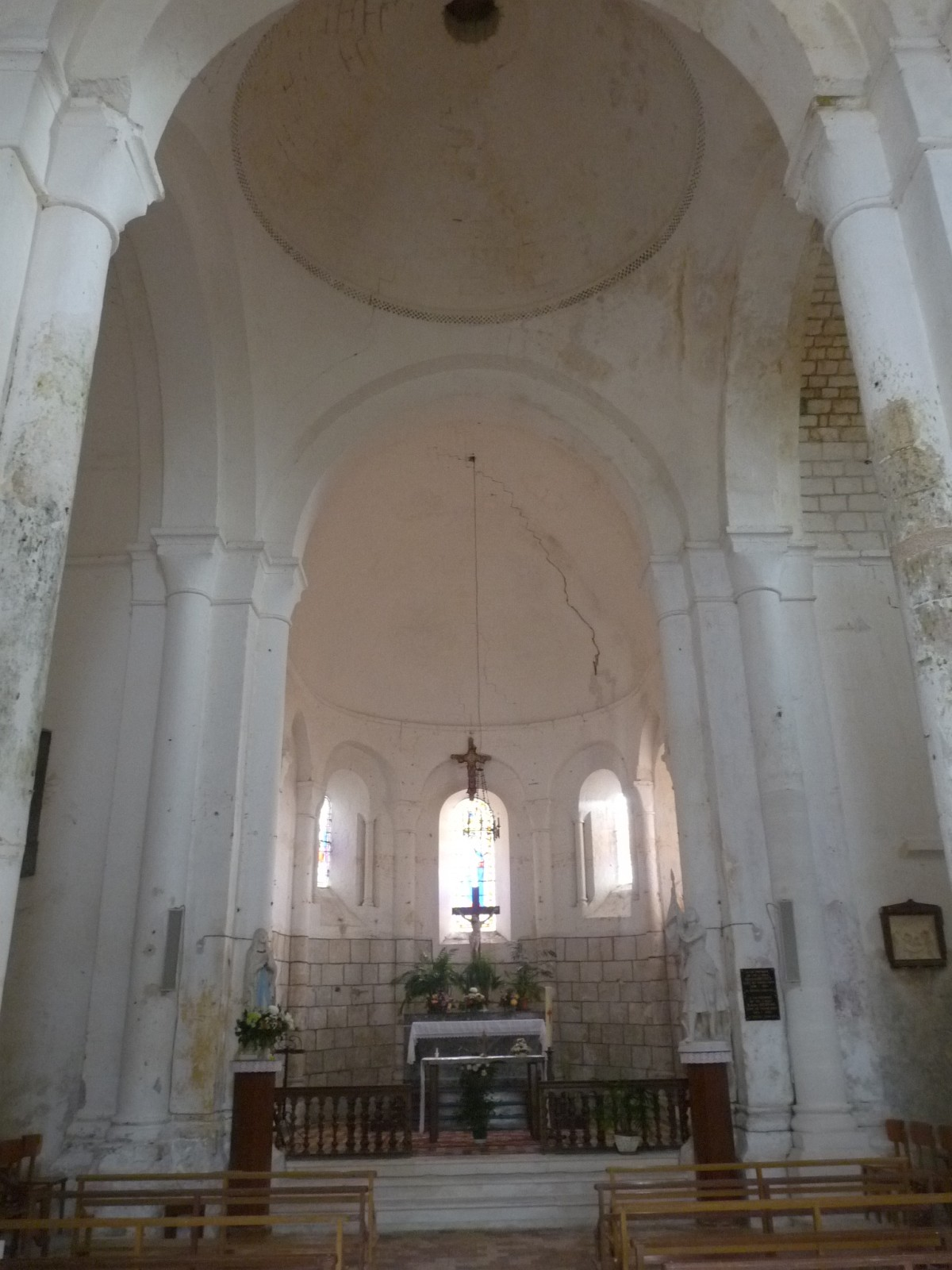 Eglise de Mainfonds, Charente, France